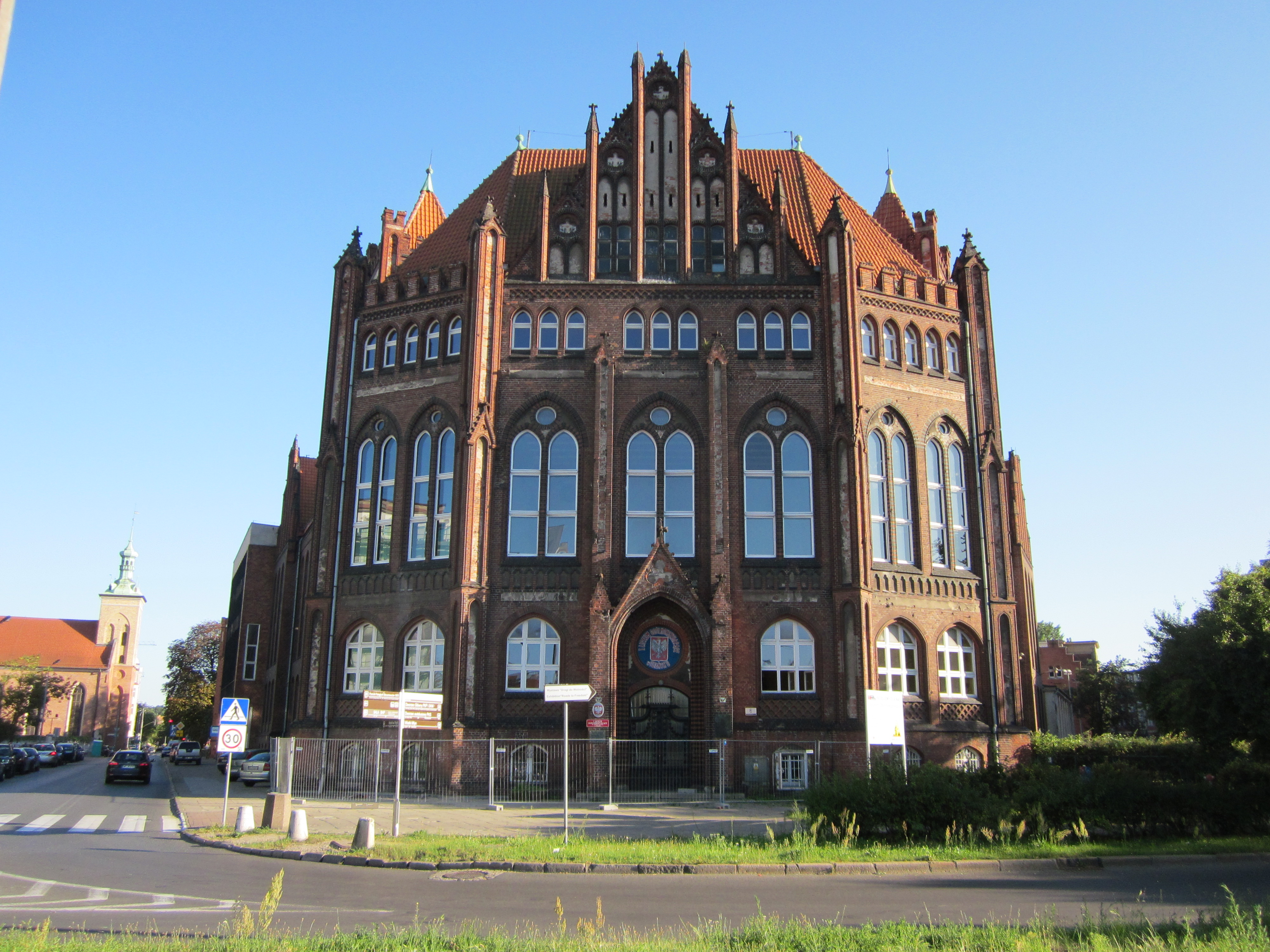 Das Kopernikus-Gymnasium in Danzig (polnisch: I Liceum Ogólnokształcące im. Mikołaja Kopernika w Gdańsku, früher: Oberrealschule zu St. Petri) befindet sich in der ulica Wały Piastowskie 6 (früher: Hansaplatz). Es wurde 1902 bis 1904 errichtet.